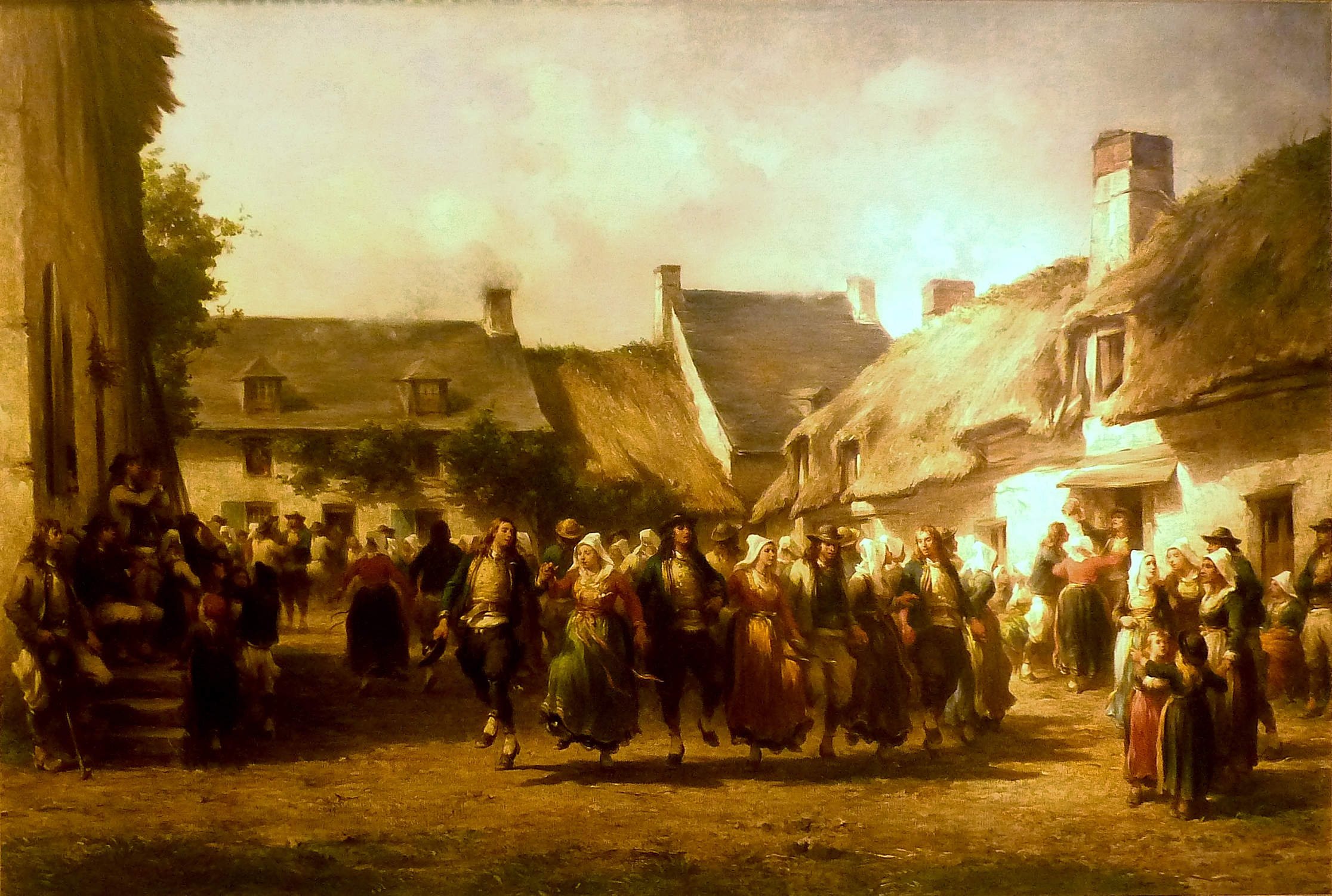 De jeunes mariés de la région de Scaër dansent la gavotte ; deux sonneurs jouent l'un de la bombarde, l'autre du biniou ; un mendiant est présent.